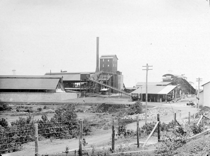 Repronegatief. Eindstation kabelbaan, droogoven en kolenbunker